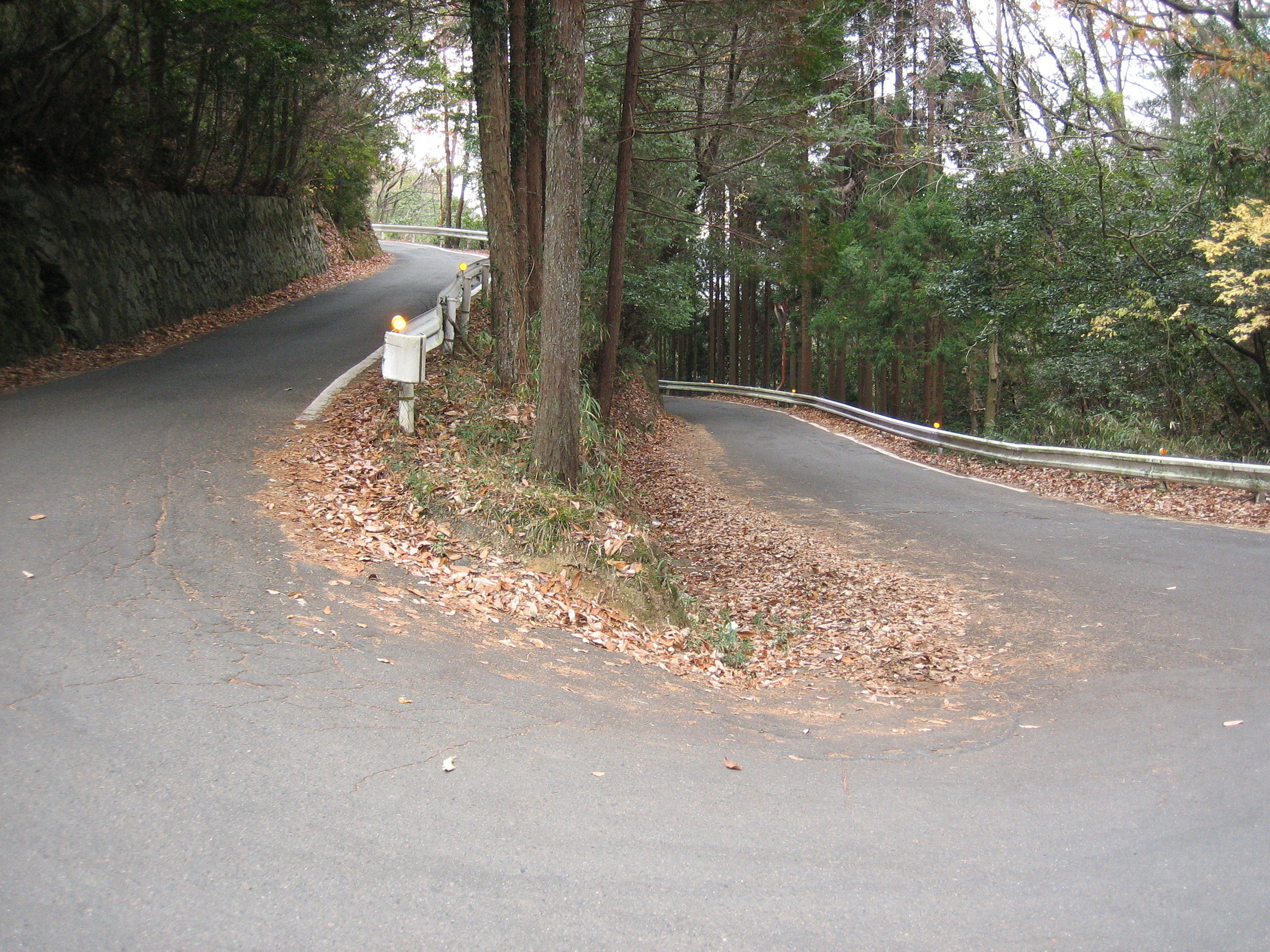 京都府道31号西陣杉坂線を京都市北区大宮釈迦谷から撮影